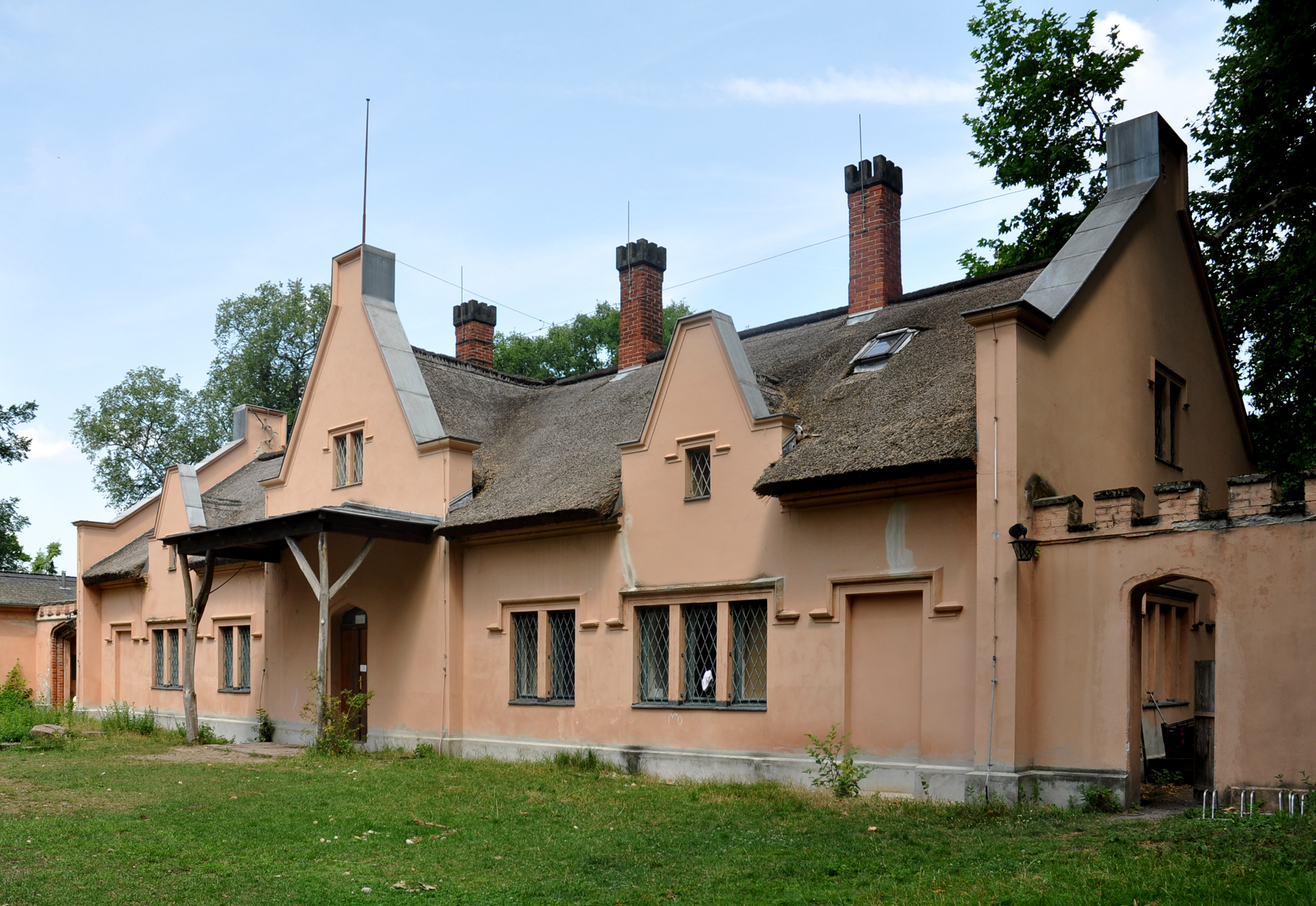 Jägerhof, der Wohnbau von Südost